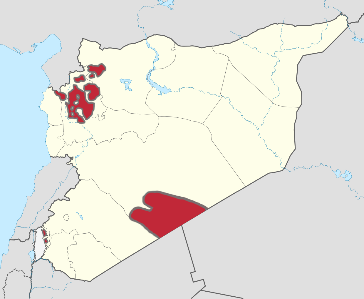 האופוזיציה הסורית בתוך סוריה